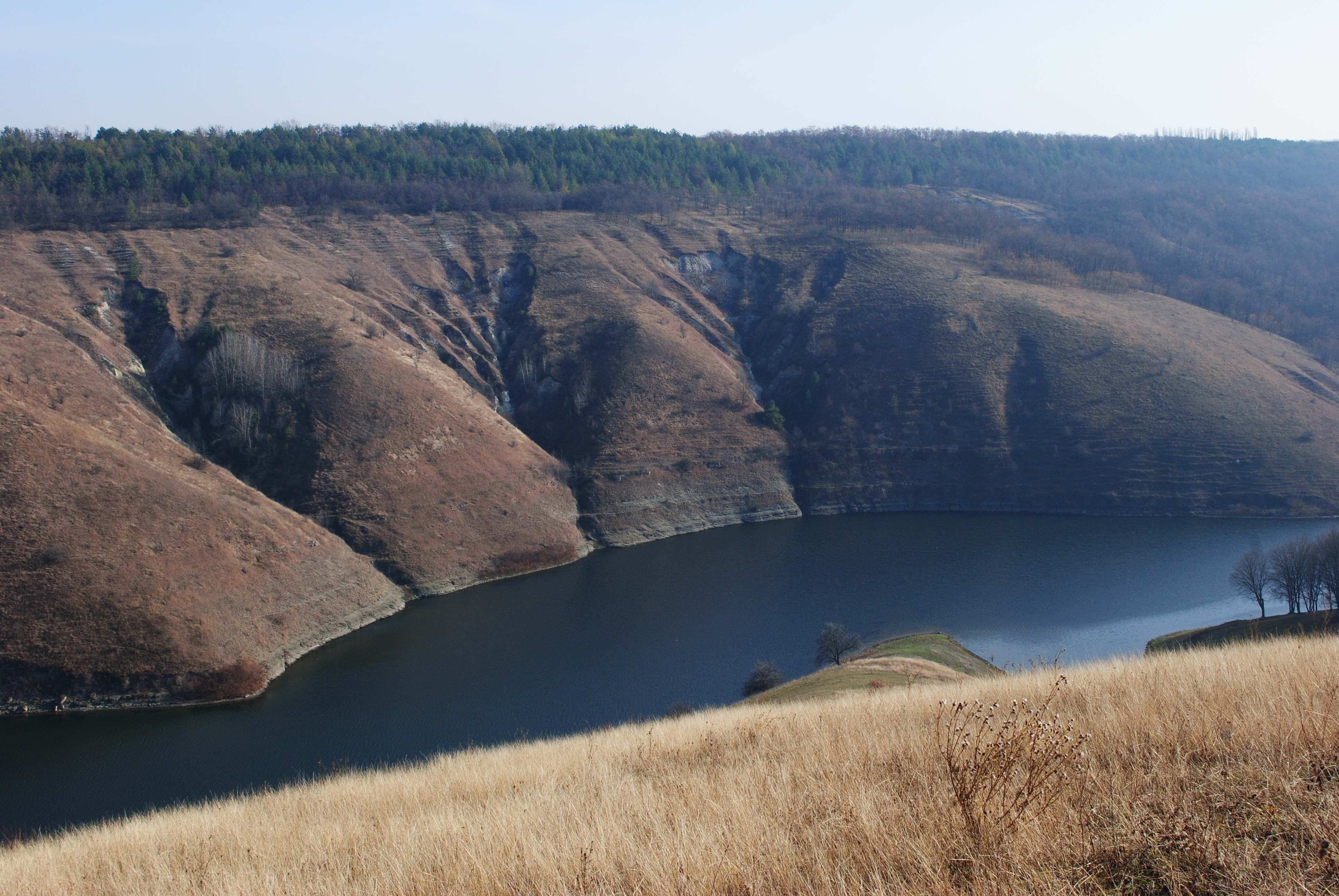 Крутосхил